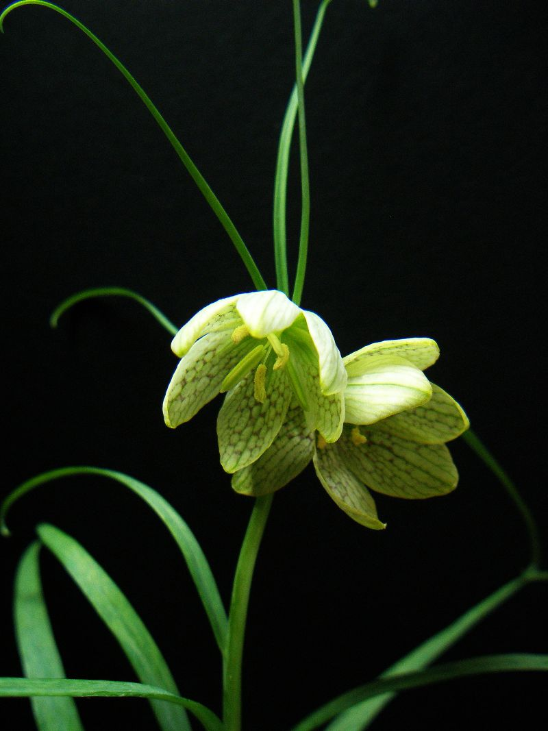 Fritillaria verticillata